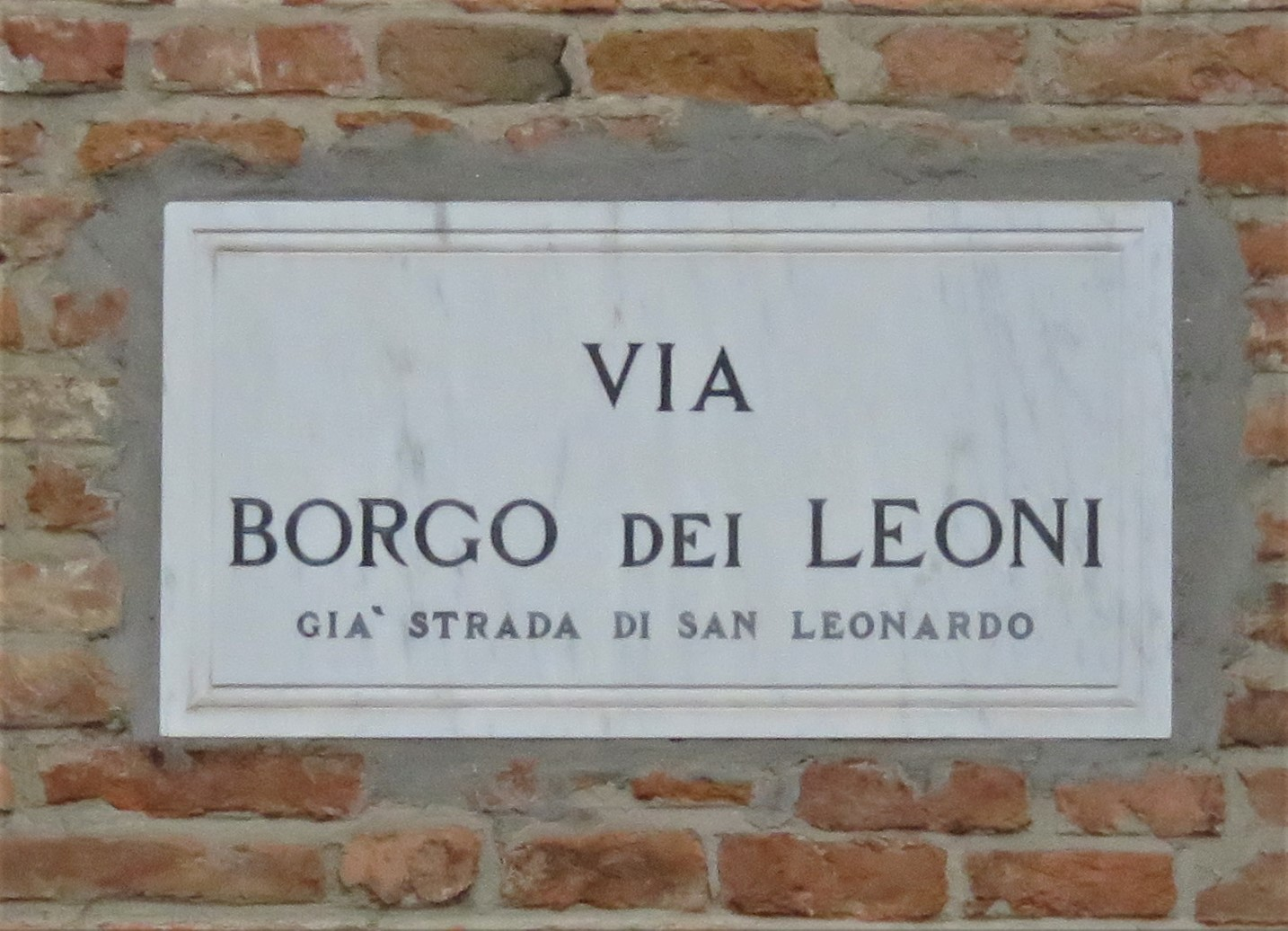 Via Borgoleoni, o via Borgo dei Leoni, Ferrara. Targa.